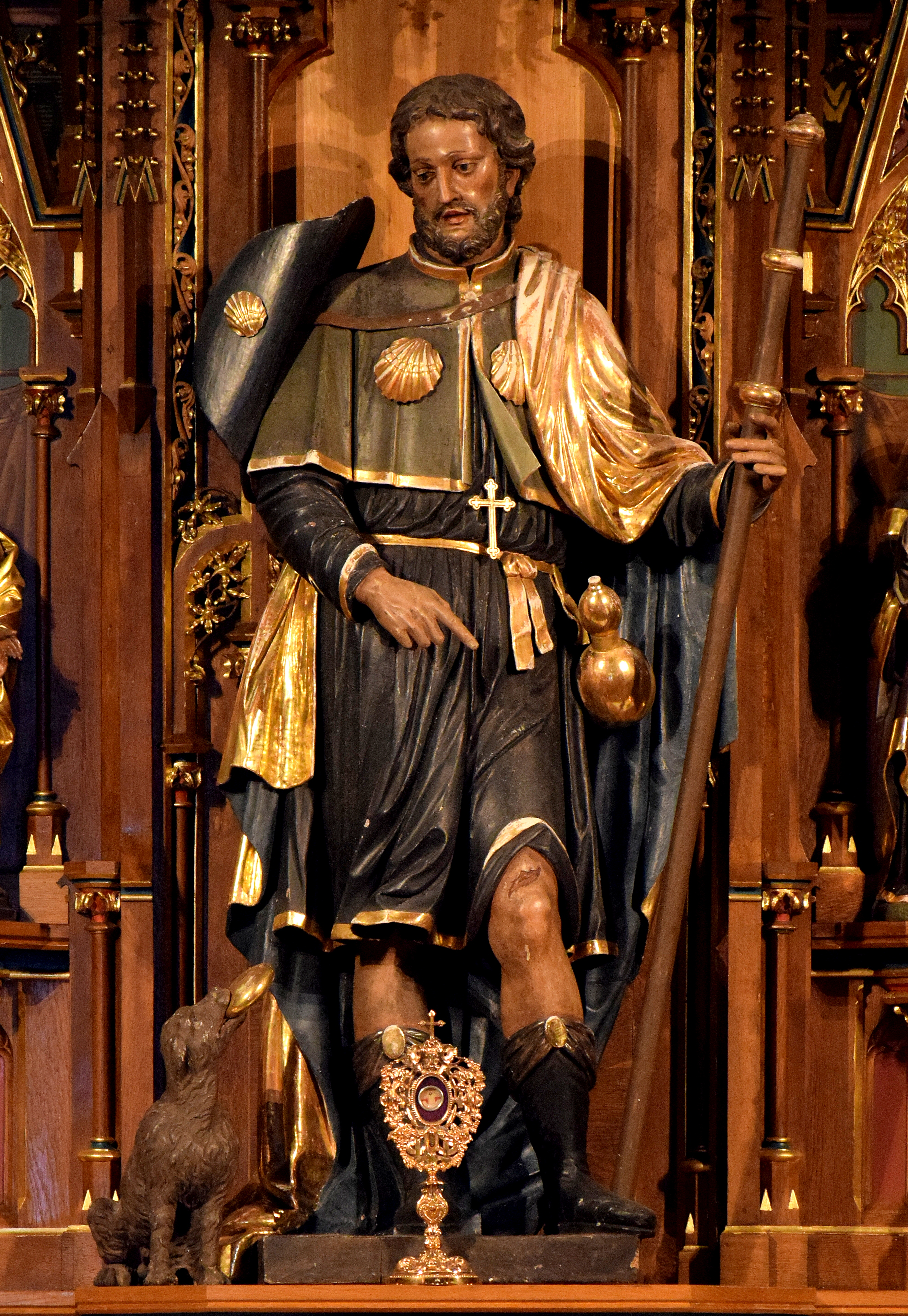 Rochus (hillige)